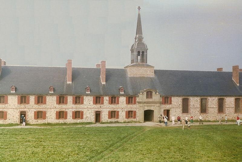 Bastion du Roi